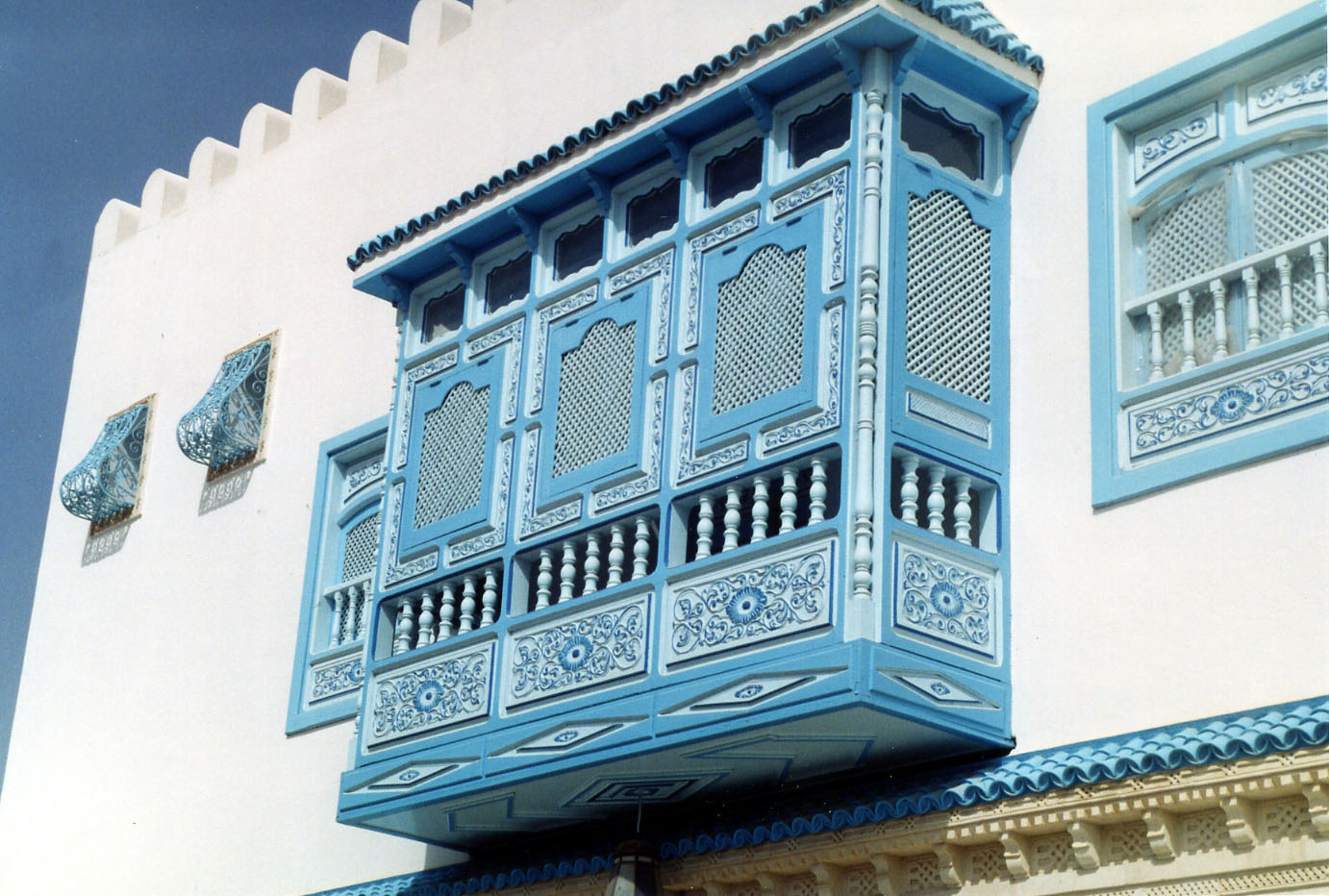 Moucharabier